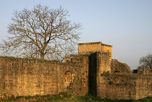 Avenches: Porte de l'Est (römische Stadtmauern)